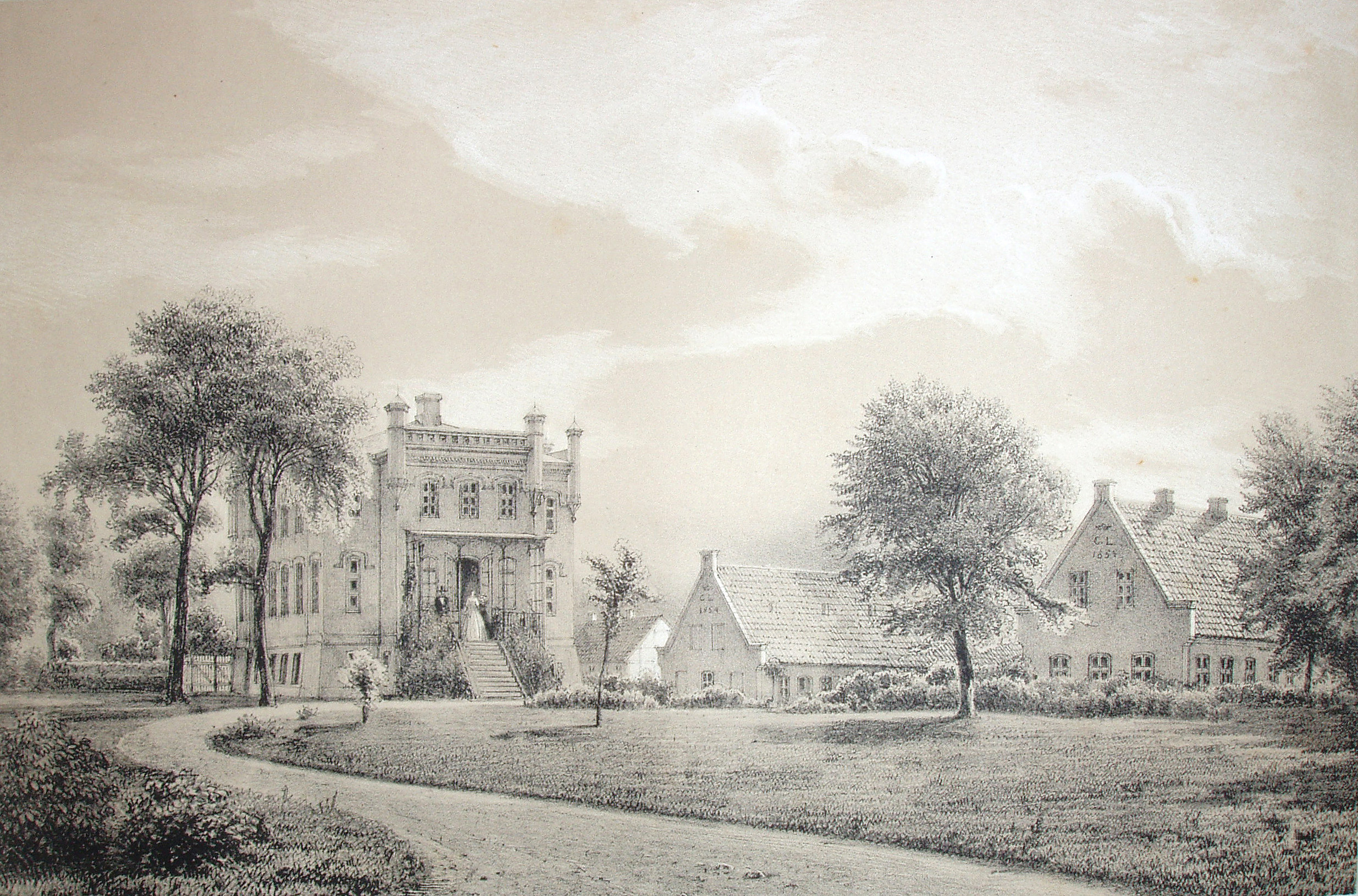 Benzonsdal er en herregård beliggende ved Torslunde, mellem Greve og Tåstrup i Ishøj Kommune. Denmark